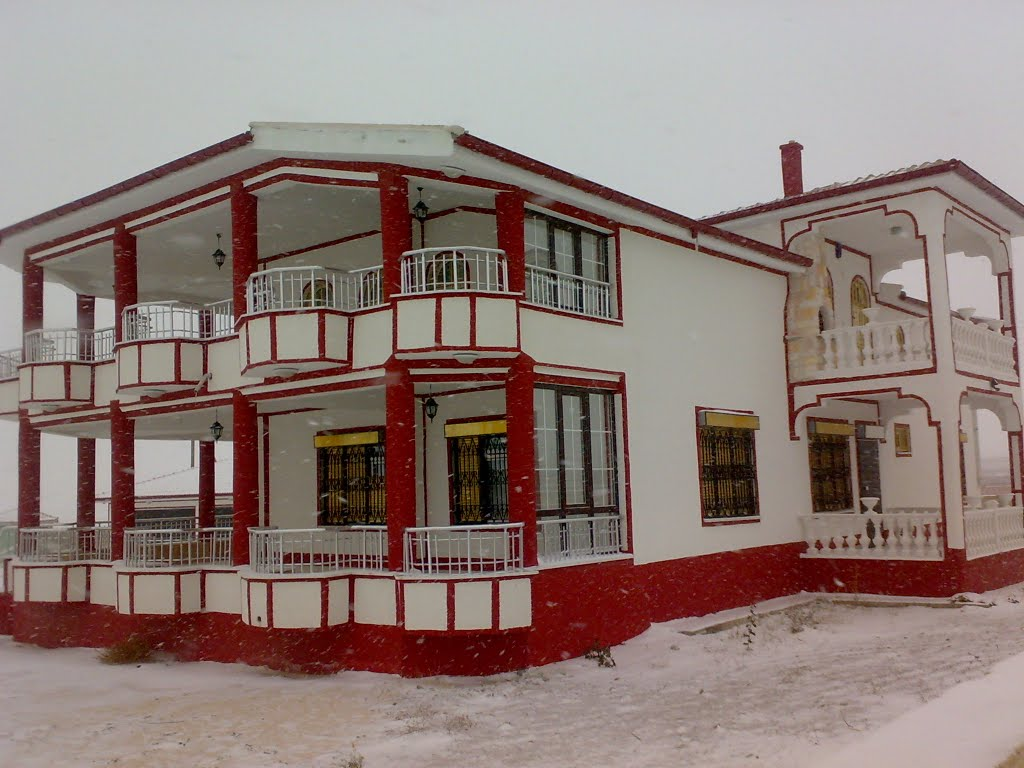 EROL ÜCLERİN EVİ